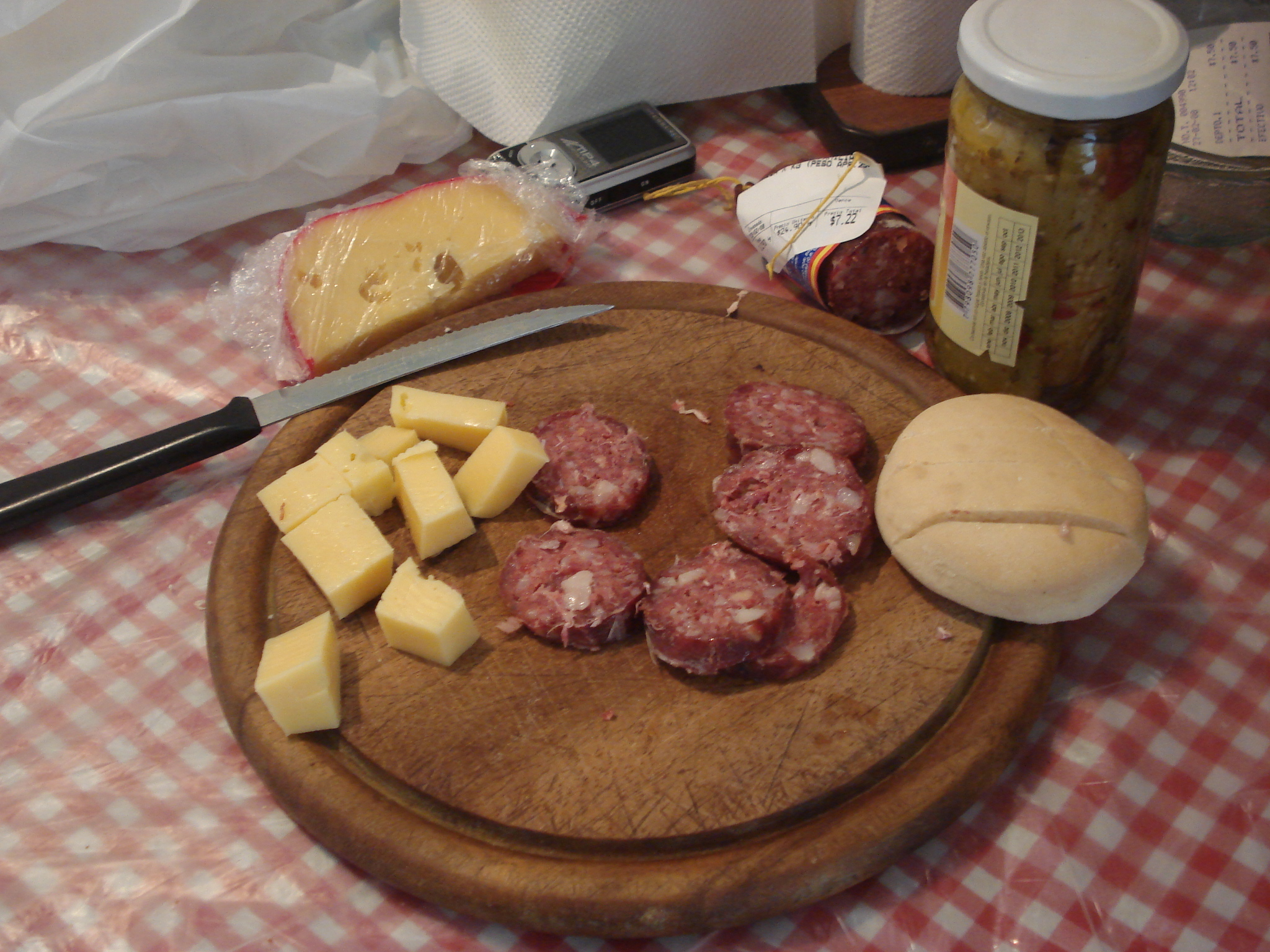 Una picada criolla, incluyendo longaniza, queso, berenjenas en escabeche y pan.